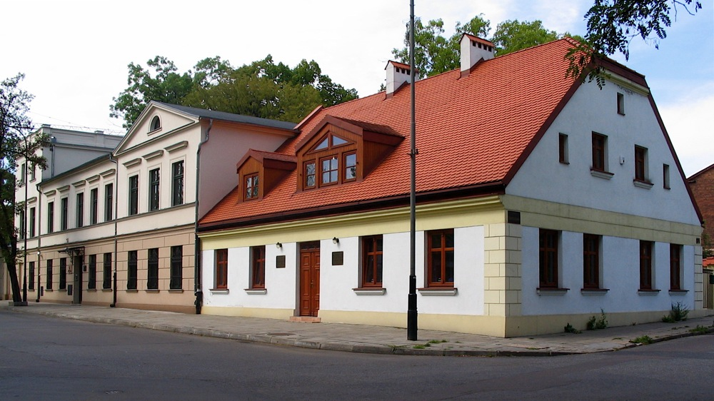 Na pierwszym planie domek Traugotta Grohmanna (ul. Targowa 81), budynek w głębi to rezydencja Alfreda Grohmanna (ul. Tylna 14, obecnie siedziba Okręgowej izby radców prawnych).